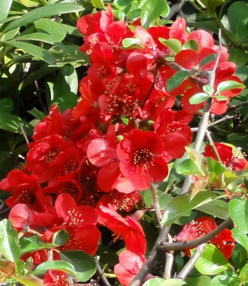 Chaenomeles